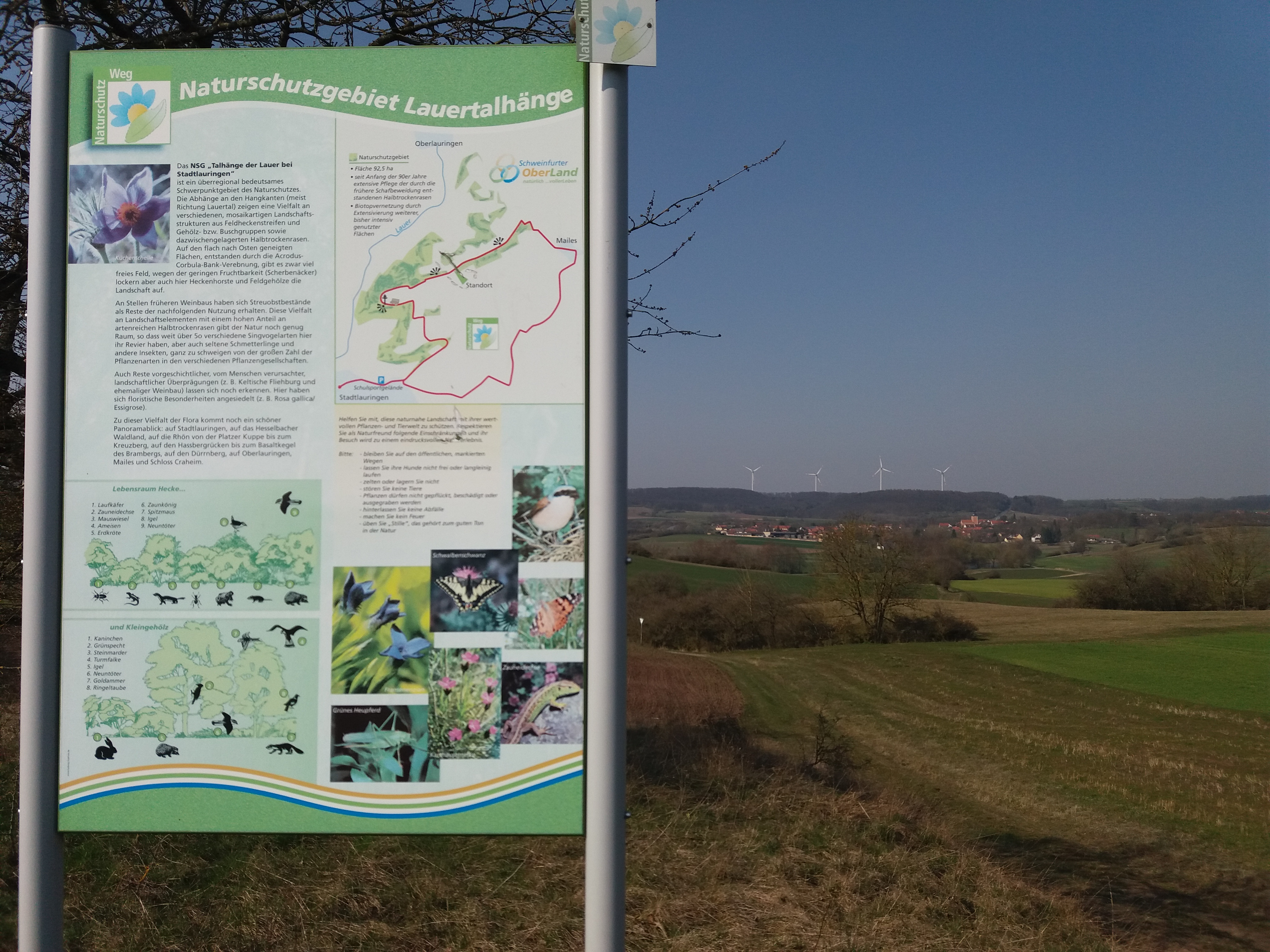 Blick von der Altenburg über die Acrodis-Corbula-Verebnung in Richtung Oberlauringen